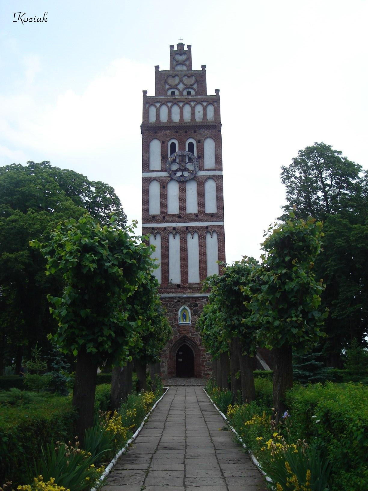 Łankiejmy - kościół p.w. św. Jana Chrzciciela (zabytek A-1170)